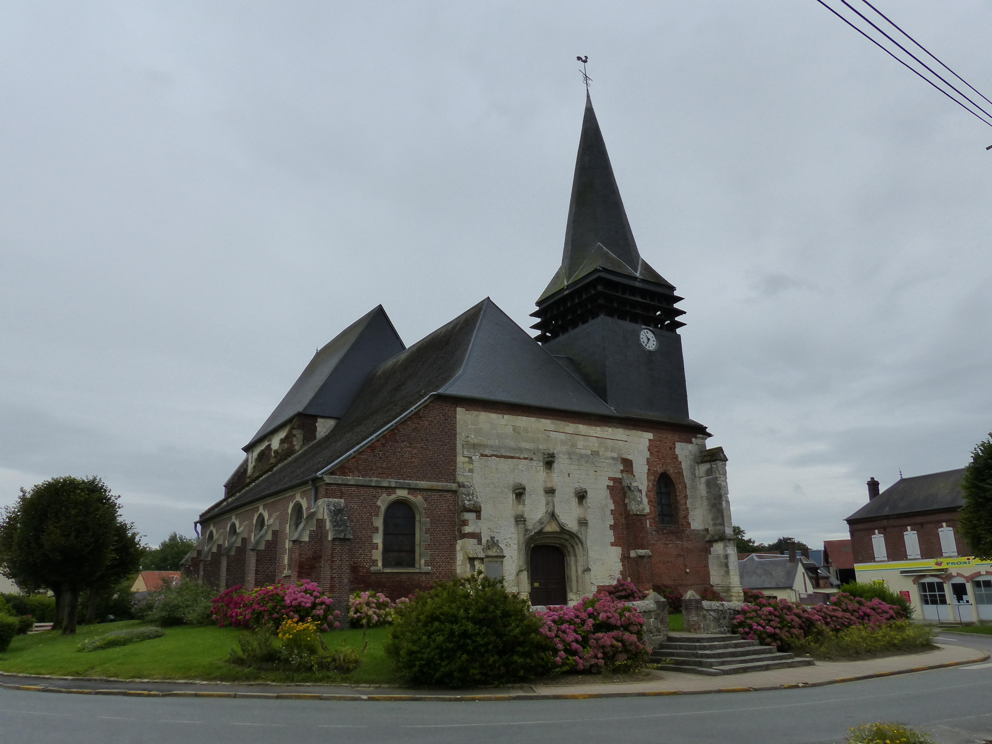 Eglise paroissiale Saint-Simon et Saint-Jude de Wavignies